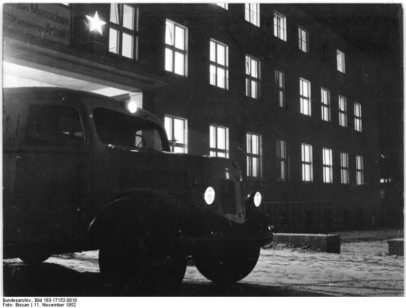 Zentralbild-Biscan Kno-Ho. 11.11.1952 Magdeburg bei Nacht Blick auf die Pawlow-Poliklinik, die in unmittelbarer Nähe der Schwermaschinen-Betriebe zur Betreuung der Werktätigen errichtet wurde.